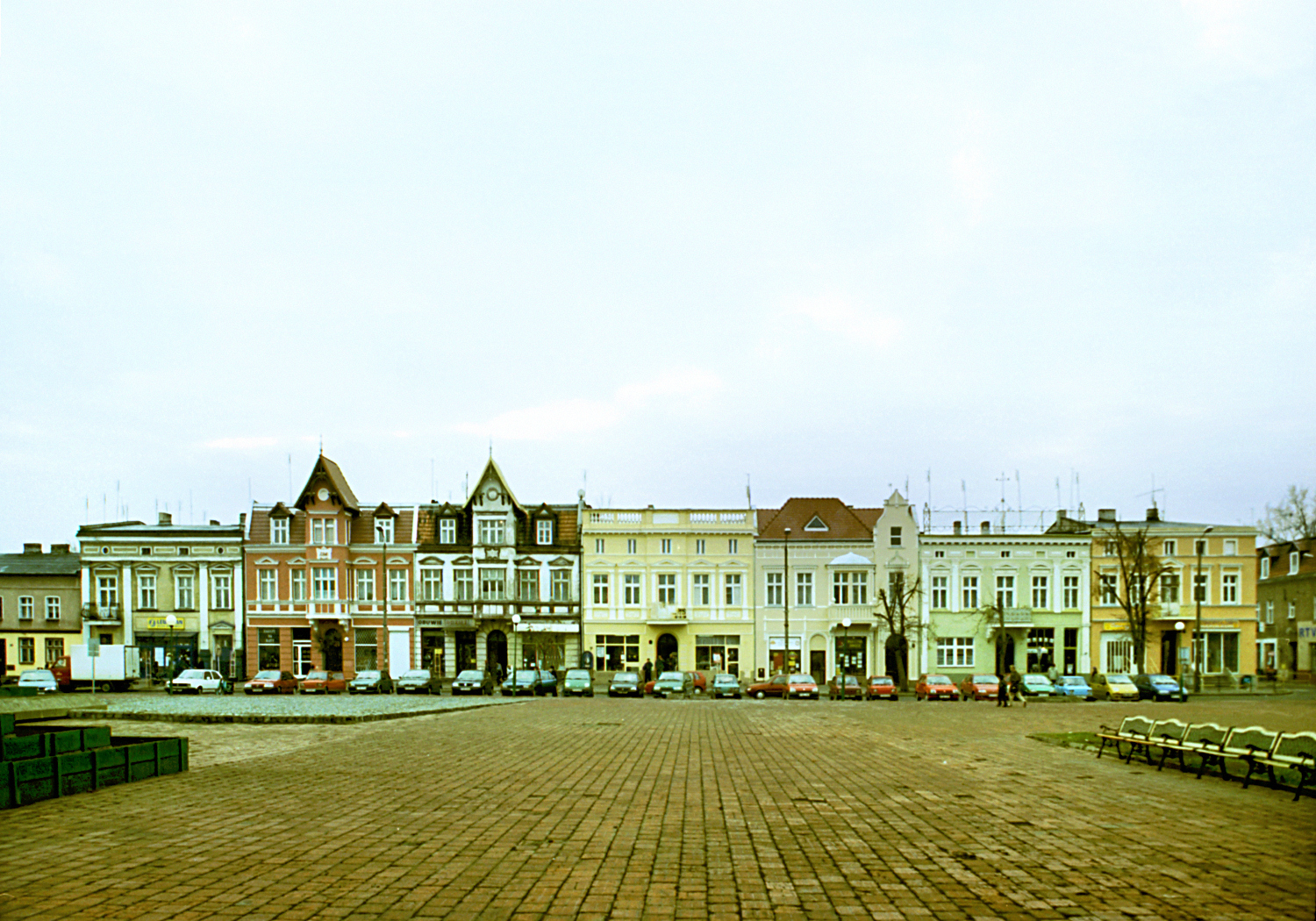 Oborniki; rynek (Oborniki, market square)